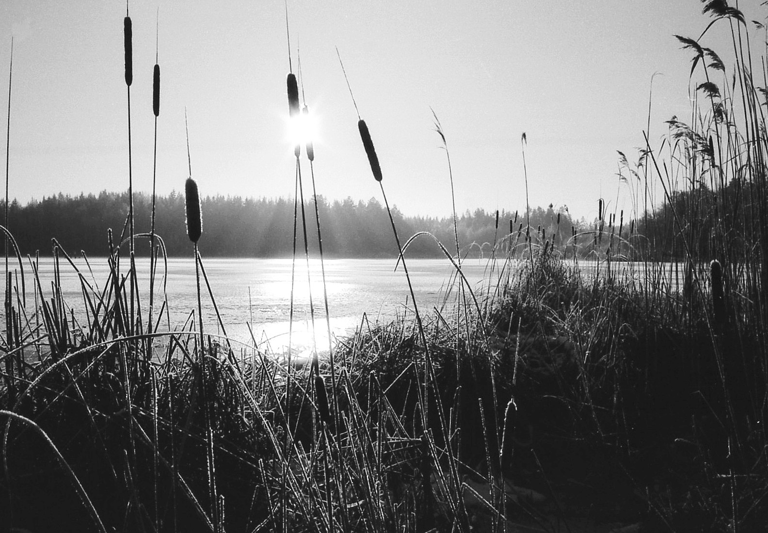 Översjön, januari 1972